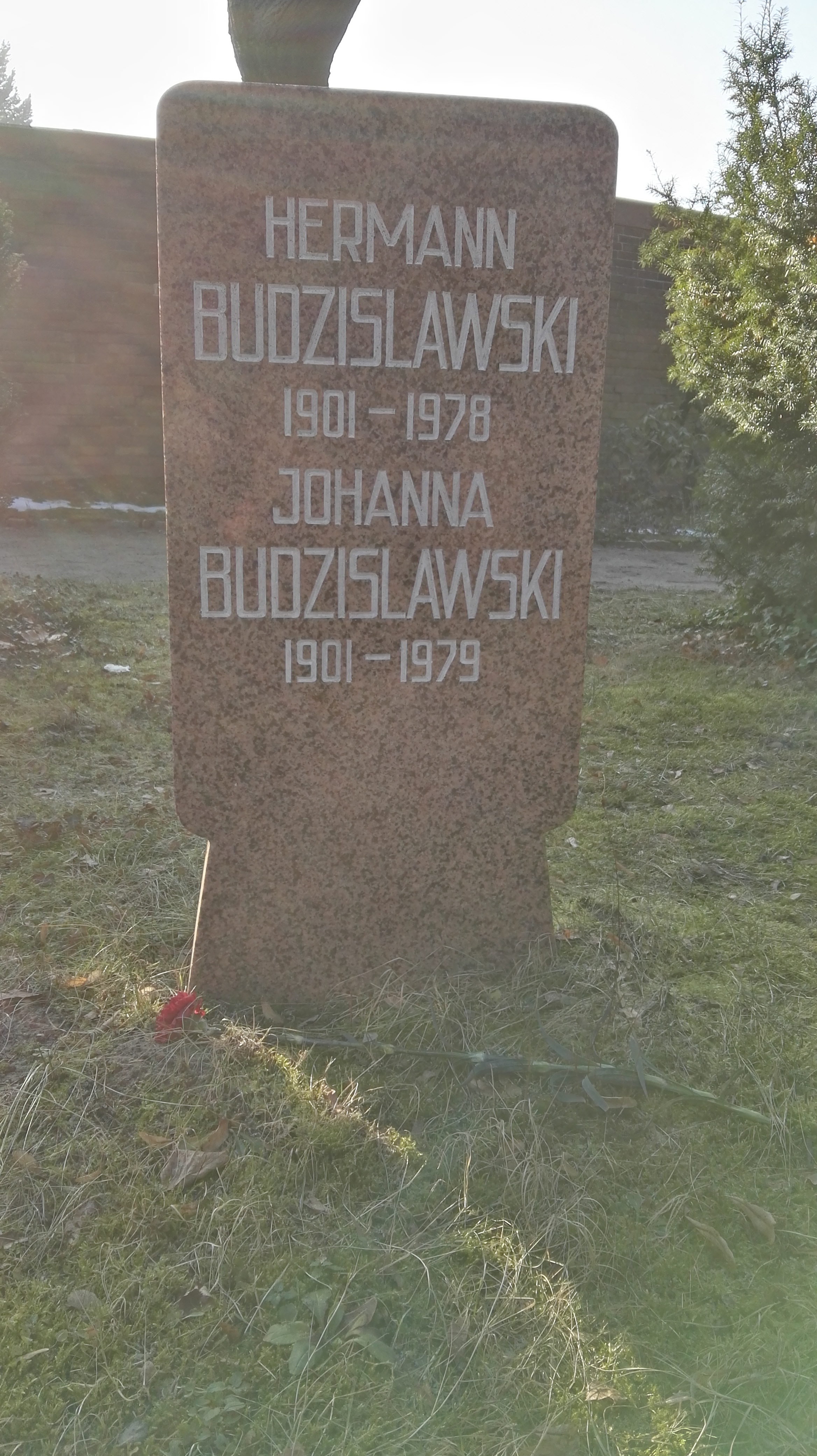 Grab von Hermann Budzislawski und Johanna Budzislawski in der Grabanlage Pergolenweg auf dem Sozialistenfriedhof des Zentralfriedhofs Friedrichsfelde